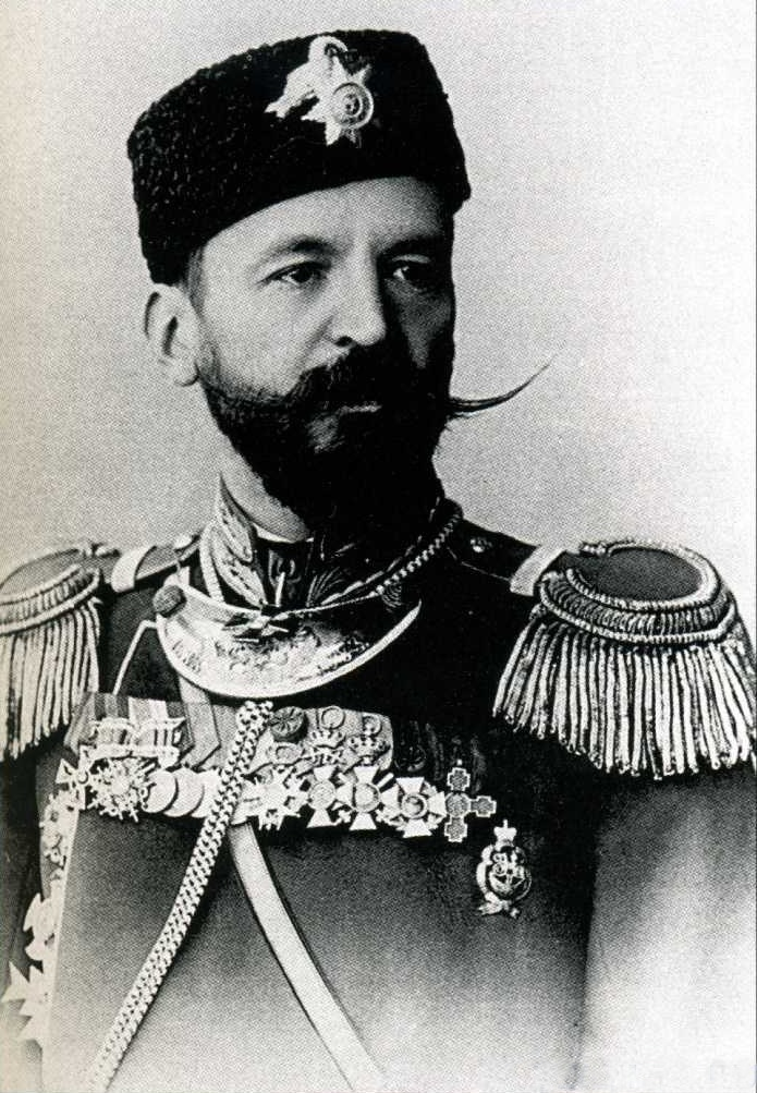 генерал-лейтенант Измаил Владимирович Коростовец (полковник лейб-гвардии Преображенского полка).